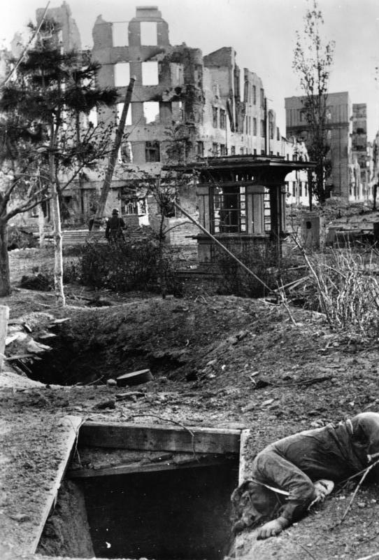 Russland, Kampf um Stalingrad, Ruinen Scherl: Deckungsgraben und Unterstände in dem Ruinenfeld von Stalingrad. Die Sowjets wehrten sich verzweifelt, und sie mußten erst in erbitterten Kämpfen niedergerungen werden. PK-Aufnahme: Kriegsberichter Bauer-Altvater (Sch) 17.10.42 [Herausgabedatum] ADN-Bildarchiv: II. Weltkrieg Schlacht um Stalingrad: Juli 1942-Februar 1943 Mitten in der Stadt hatten die sowjetischen Truppen Unterstände und Deckungsgräben angelegt und kämpften erbittert gegen die deutschen Invasoren. 5804-42 [Sowjetunion.- Schlacht um Stalingrad]